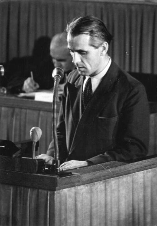 Illus/Quaschinsky 1.11.51 13. und 14. Sitzung der Volkskammer Die Volkskammer der DDR trat am 31.10.51 und 1.11.51 zu ihrer 13. und 14. Sitzung zusammen, um u.a. über das "Gesetz über den Fünfjahresplan zur Entwicklung der Volkswirtschaft der Deutschen Demokratischen Republik", den "Rechenschaftsbericht der Regierung über die Einnahmen der Republik und ihre Verwendung für das Rechnungsjahr 1950" und "das Gesetz über die Deutsche Notenbank" zu beraten. UBz: Für die SED sprach der Abgeordnete Willi Stoph.